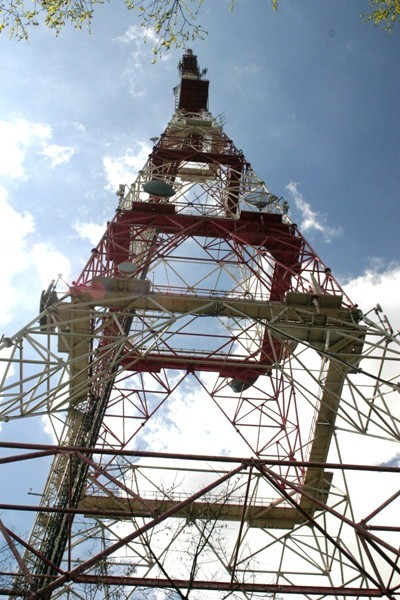 De Gittermast um Bol d'Air. Bol d'Air